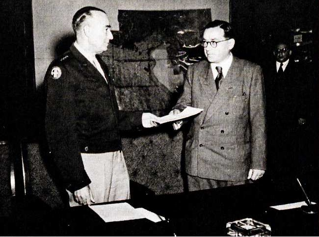 Joseph T McNarney hands Samuel Gringauz, chairman of CCLJ, the charter of recognition. Picture at Holian with courtesy of United States Holocaust Memorial Museum